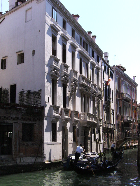 Palazzo Morosini del Pestrin in Venice, near Campo Santa Maria Formosa; picture shot from a calle near San Zanipolo church.